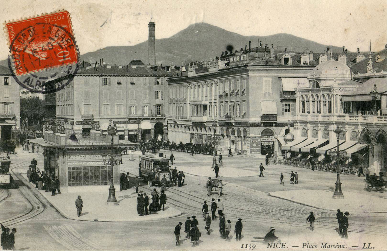 Carte postale ancienne éditée par LL, n°1139:NICE - Place Masséna